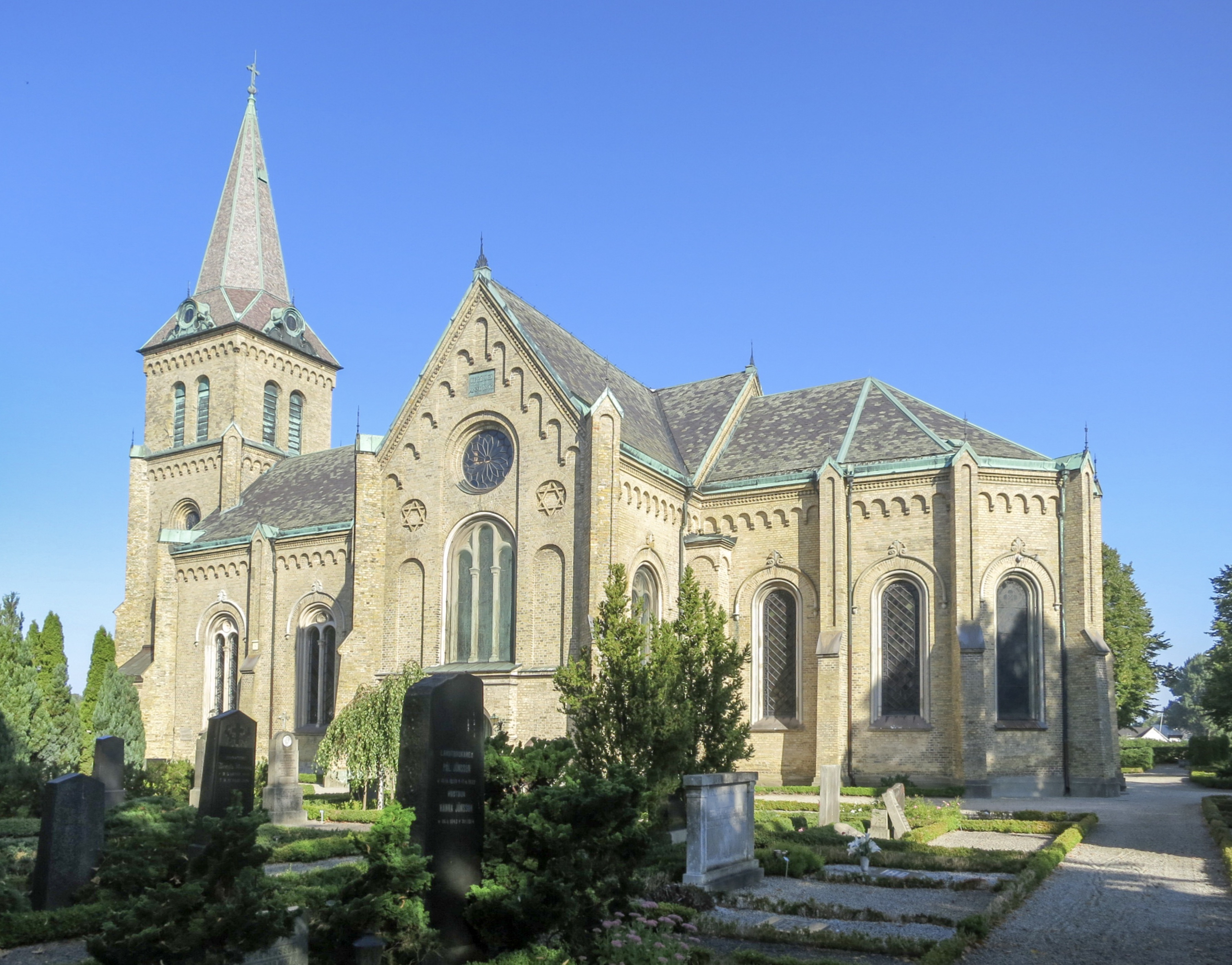 Lomma kyrka i september 2016